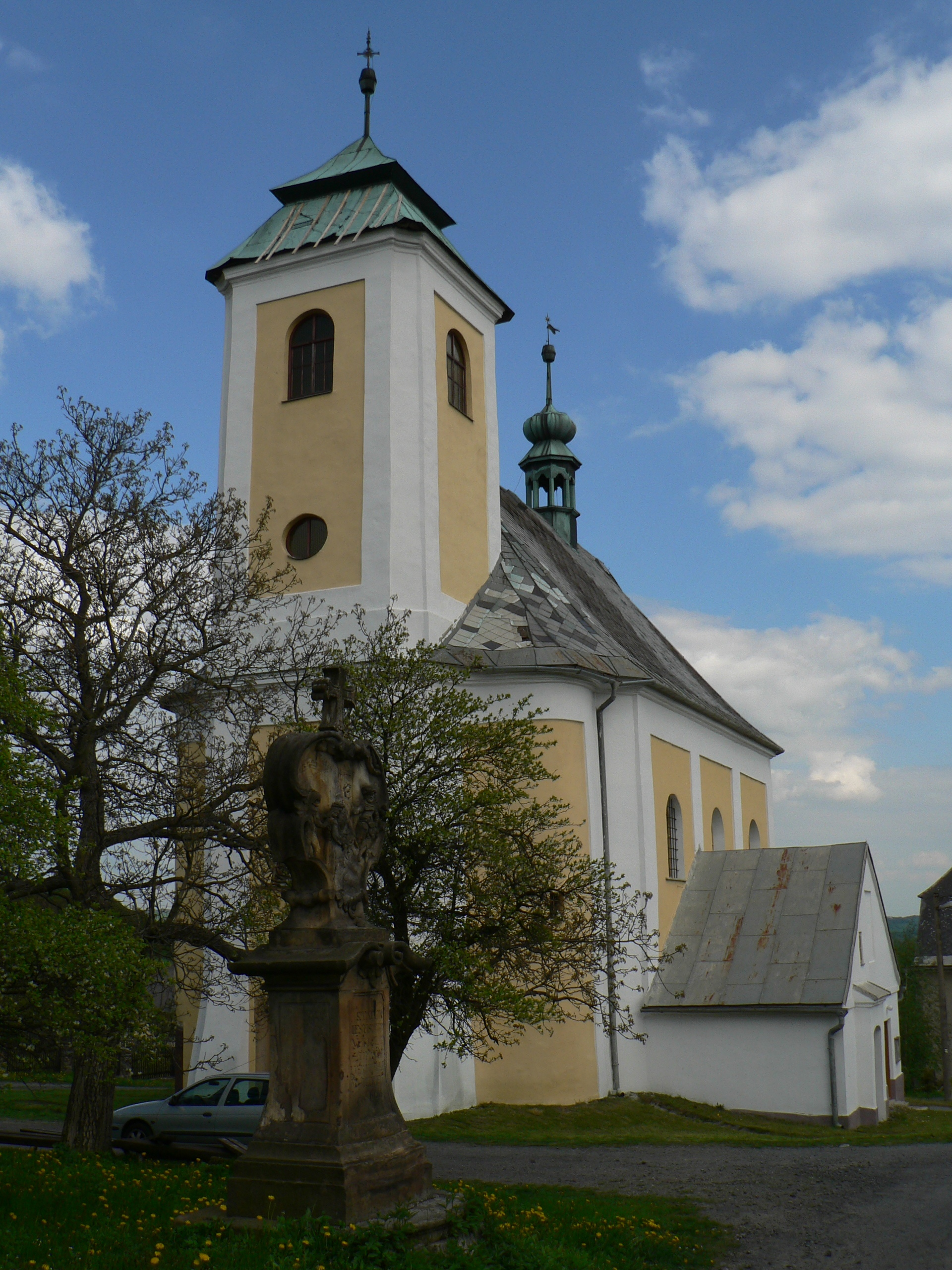 Kostel Panny Marie Sněžné (Ruda)